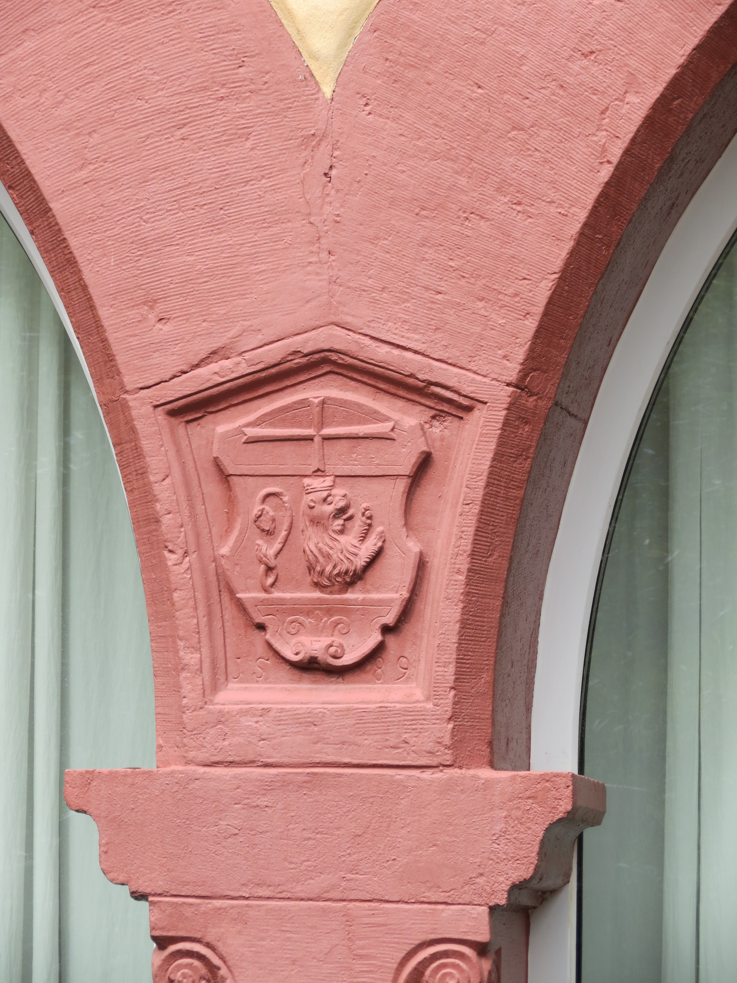 Türsturz am Kommendegebäude in Rheinfelden AG mit dem Wappen des Kommendator Wiprecht von Rosenbach von 1589